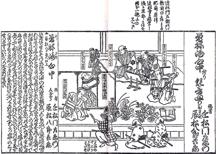 『牟芸古雅志』（瀬川如皐著）より人形浄瑠璃『曾根崎心中』上演の様子